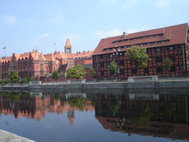 Bydgoszczi kesklinn, Poola.